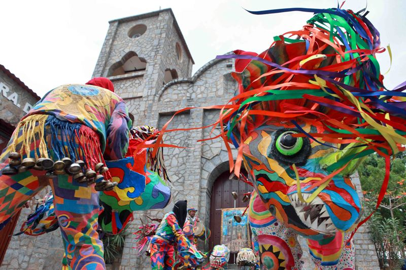 Danza (baile libre coordinado)